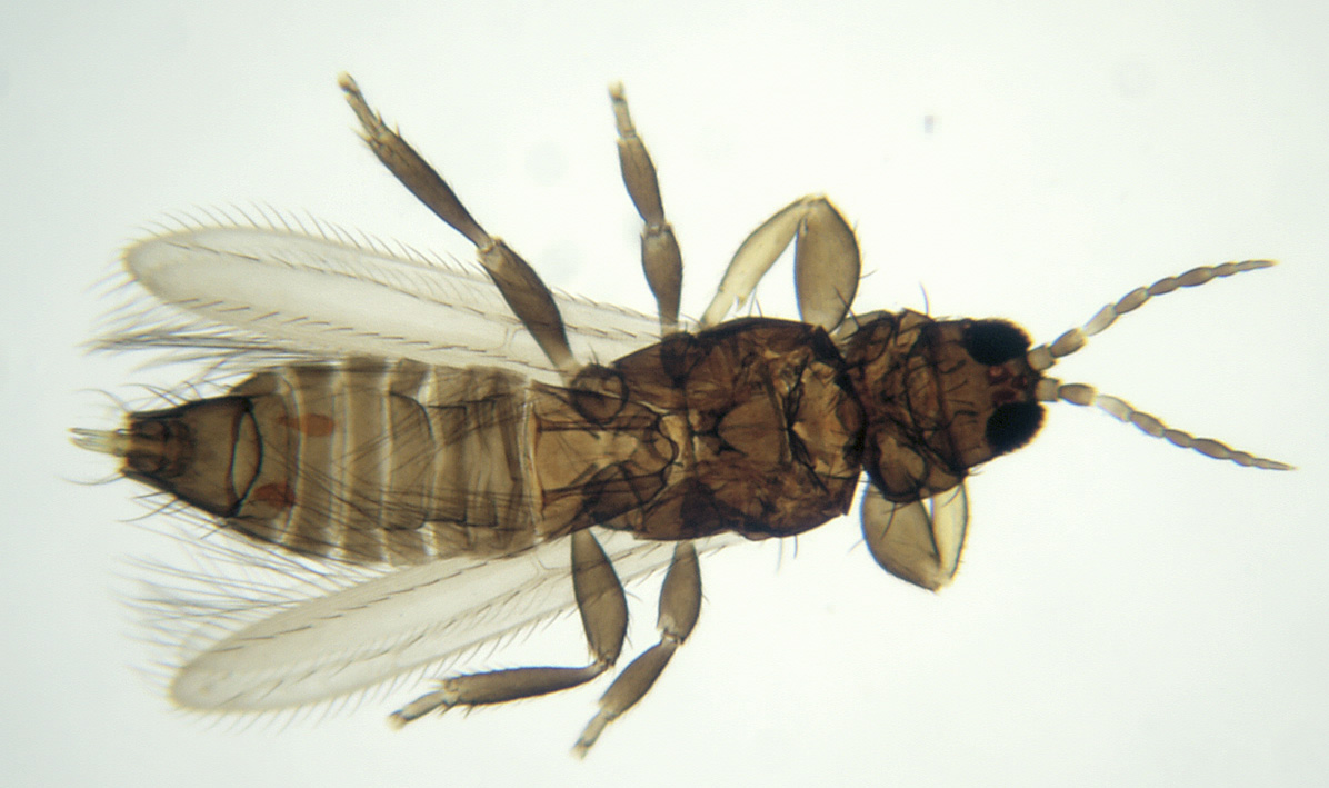 Thysanoptera. Arganda del Rey, Madrid.